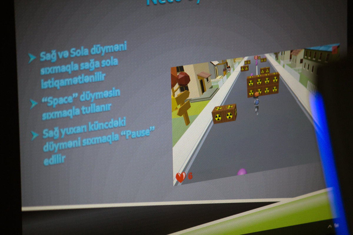 GAmajam yarışında yazılan oyunlardanbirinin nümayişi